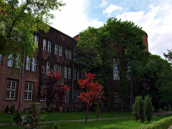 Биологически факултет